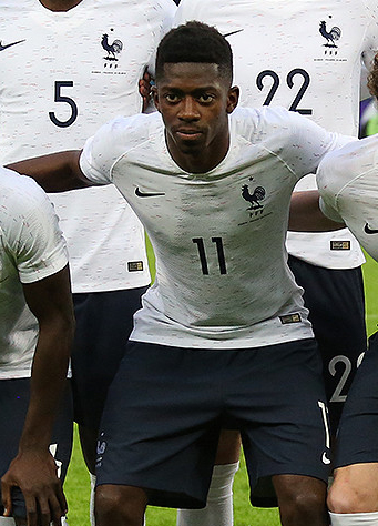 Сборная России проиграла французам